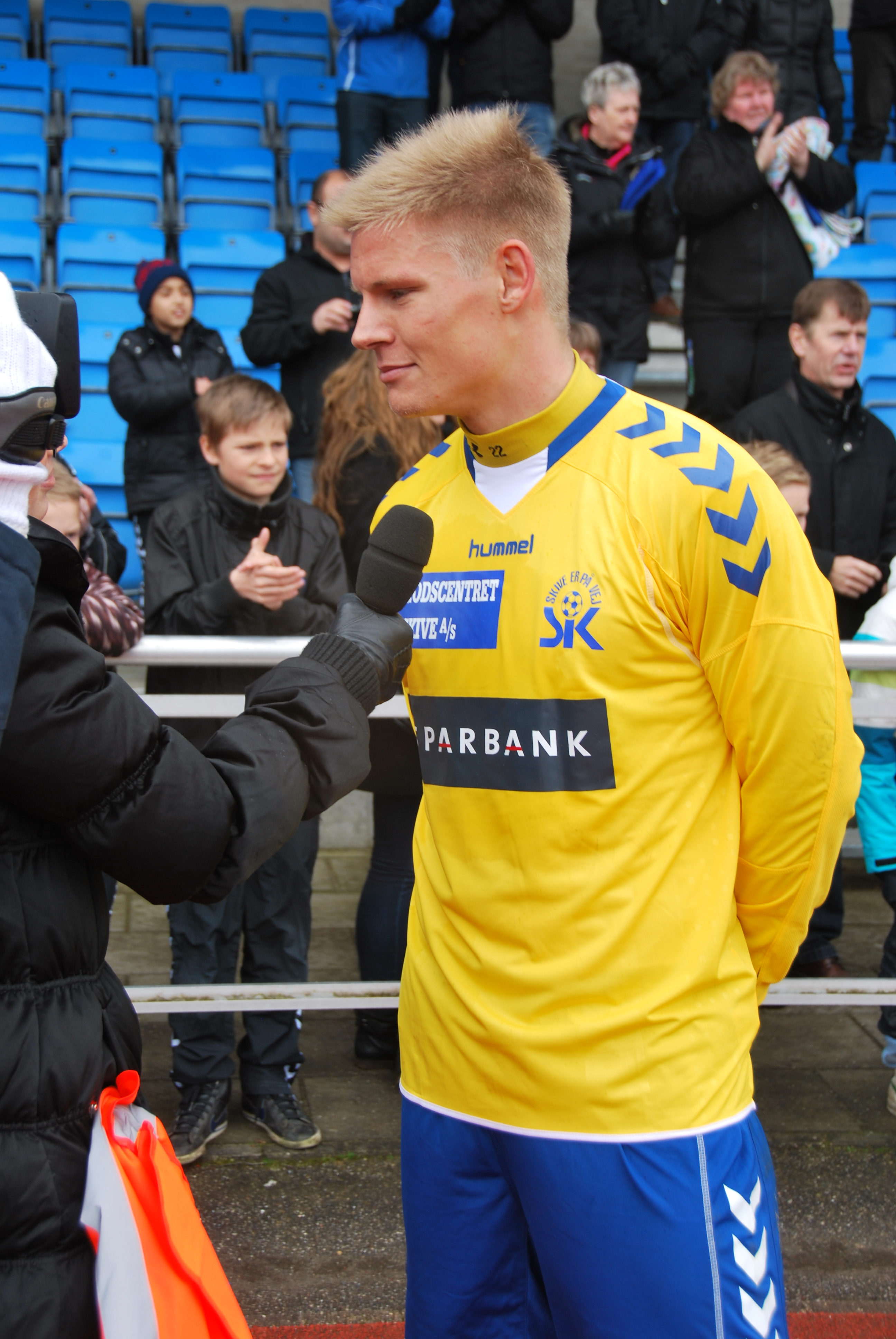 Fodboldspilleren Morten Beck Andersen fra Skive IK. Her efter en 1. divisionskamp mod Blokhus FC på Skive Stadion.